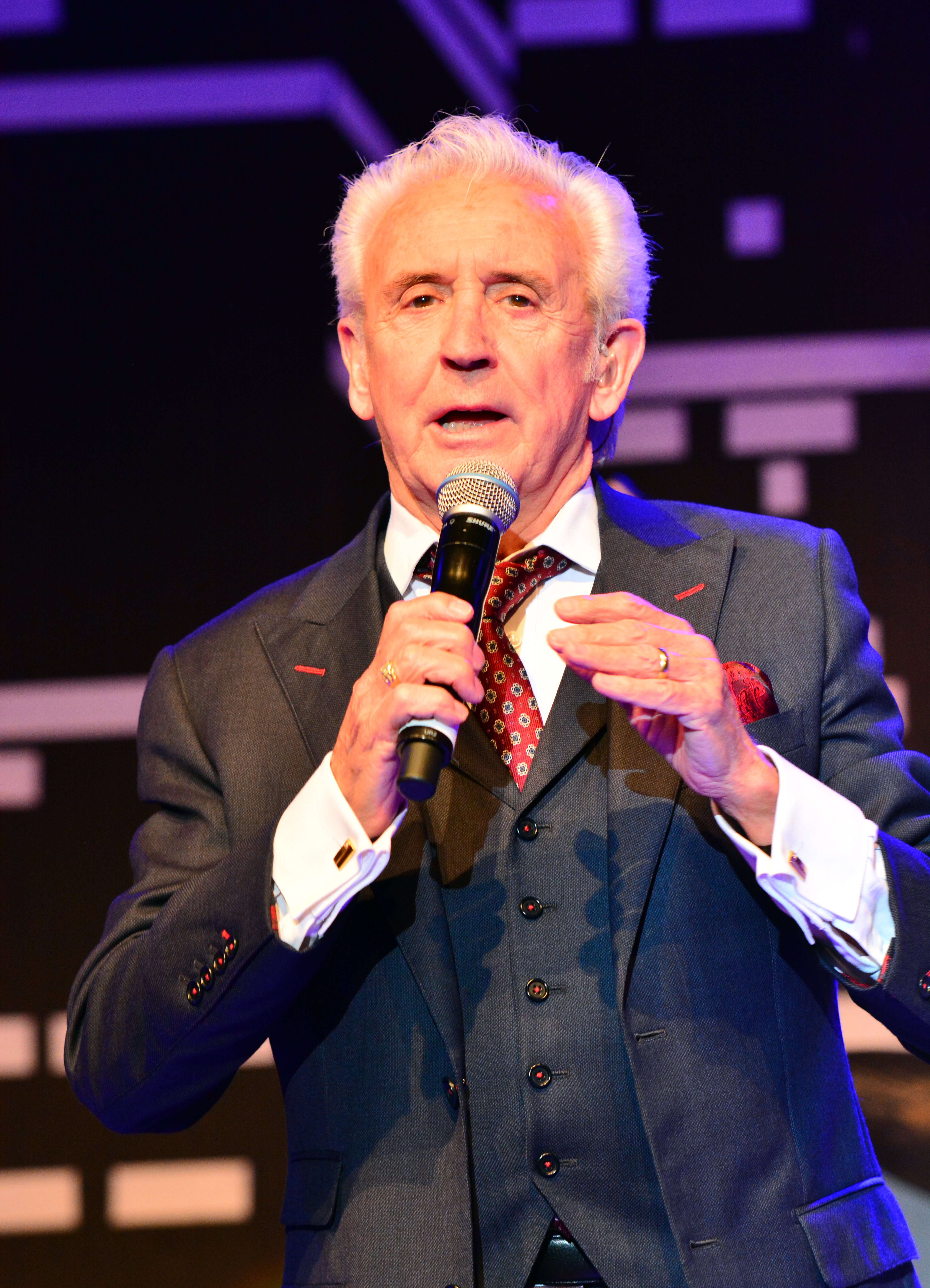 Tony Christie bei Appen musiziert 2015